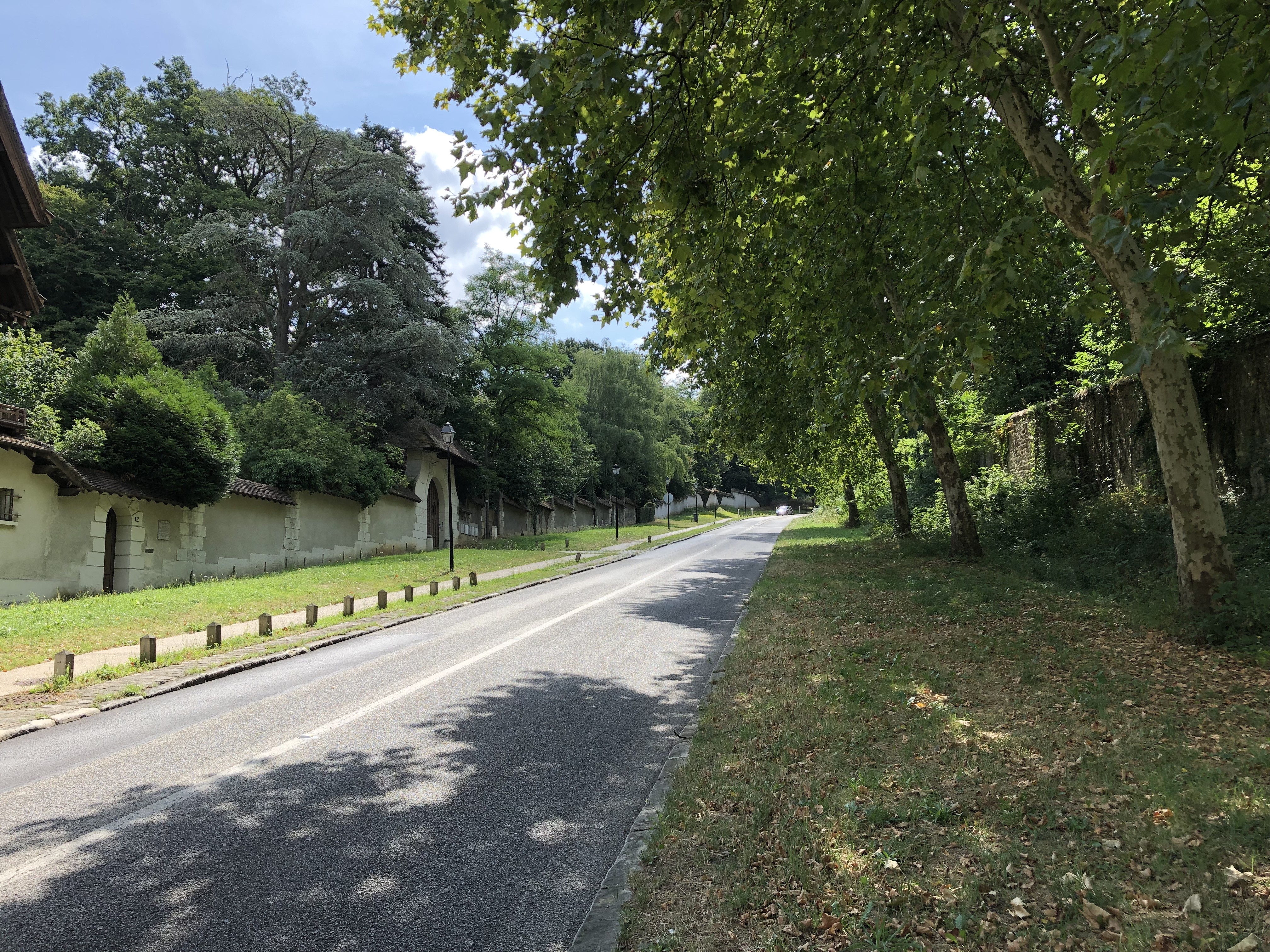 La côte du Coeur Volant à Louveciennes